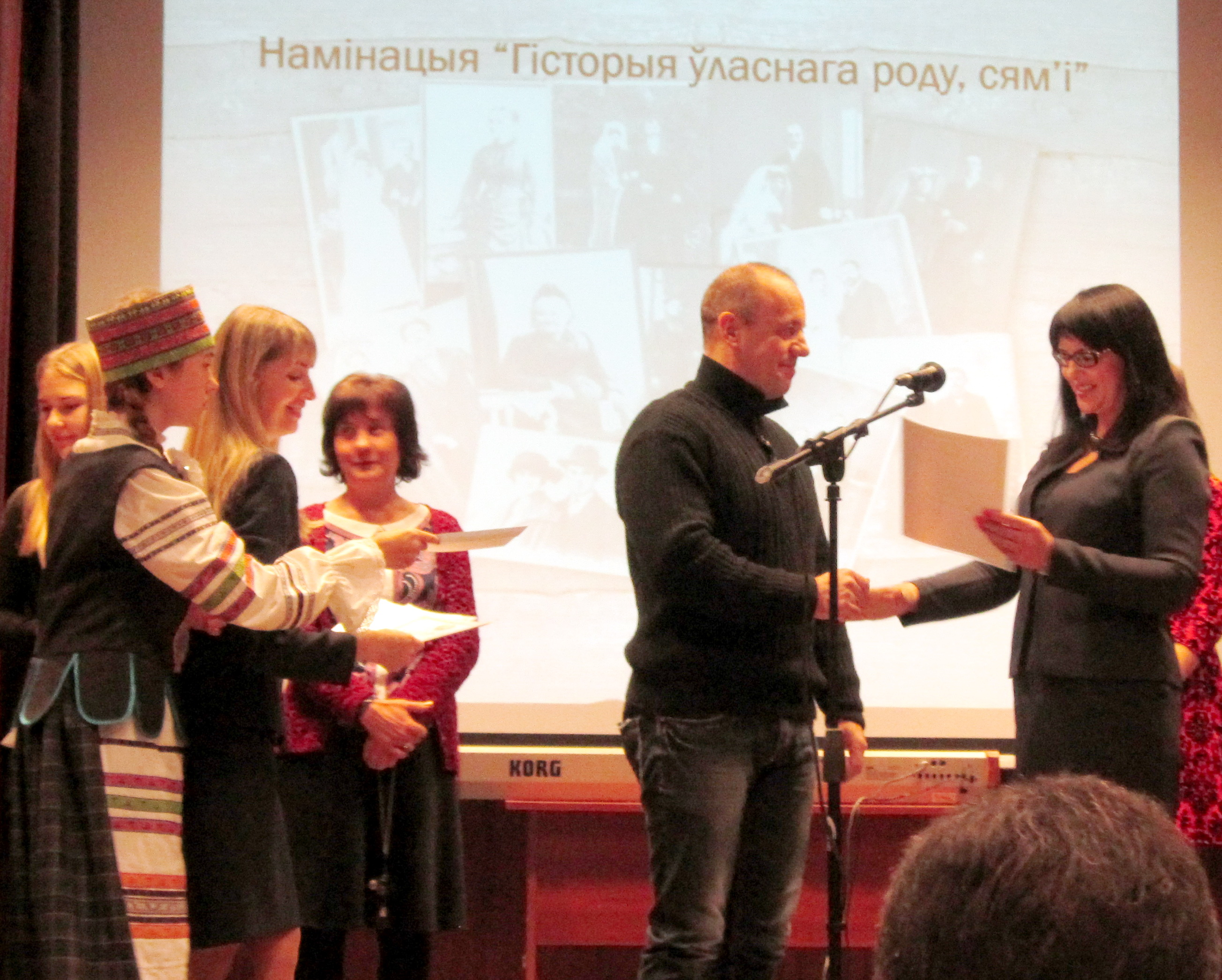 Узнагароджанне дыпломам I ступені на рэспубліканкім конкурсе навукова-даследчых работ «Памяць роду: мінулае вачыма сучаснікаў». Узнагароджвае начальнік упраўлення па справах моладзі Мінадукацыі РБ Н. Пшанічная